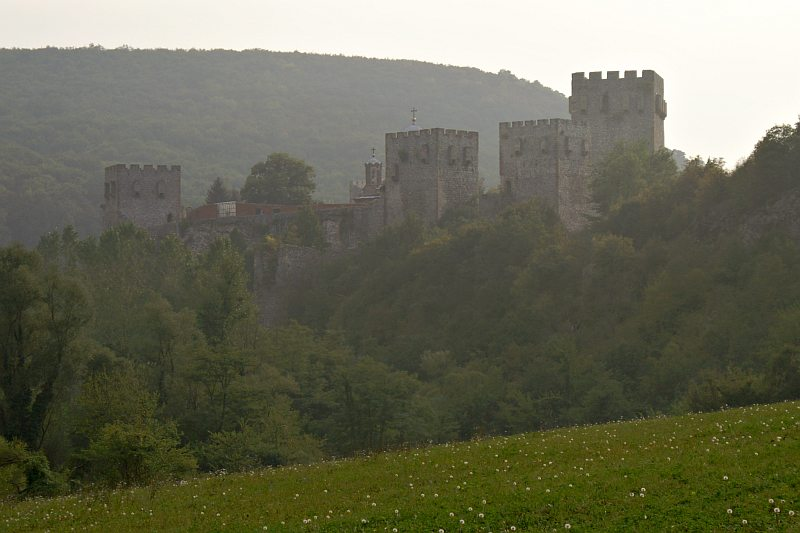 Le monasère mediaval Manasija en Serbie